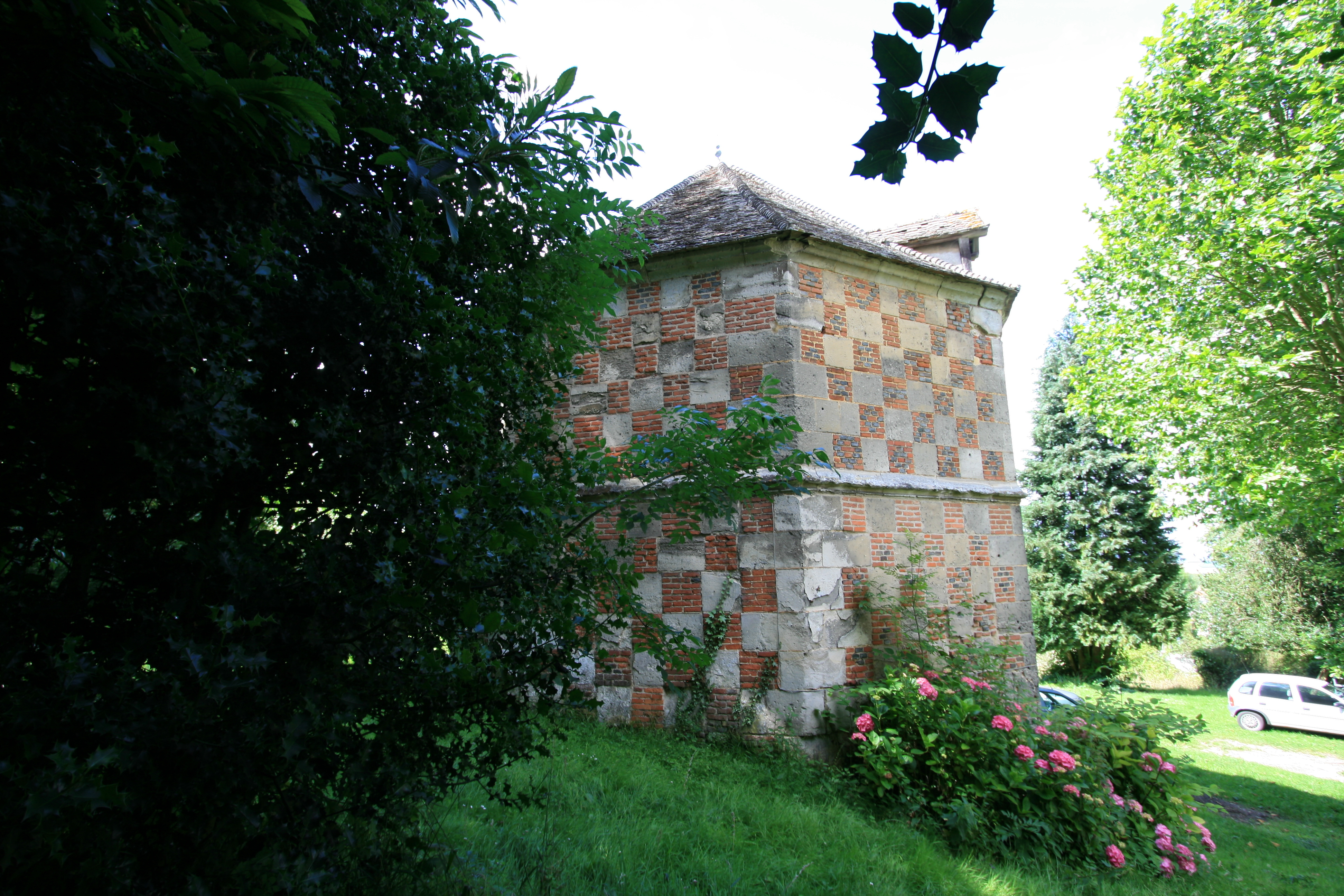 Chateau d'Arthies, Val d'Oise, France - Le pigeonnier